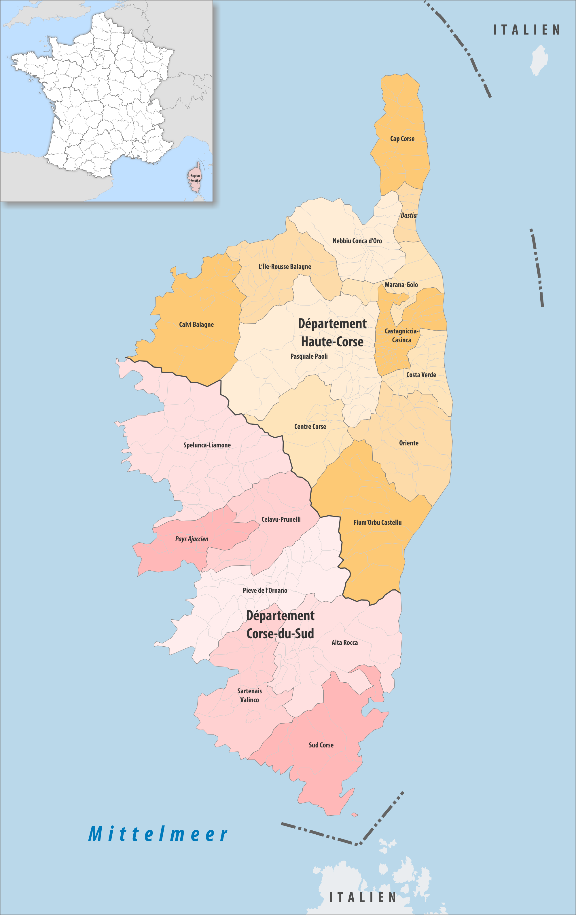 Gemeinden, Gemeindeverbände und Départemente in der Region Korsika